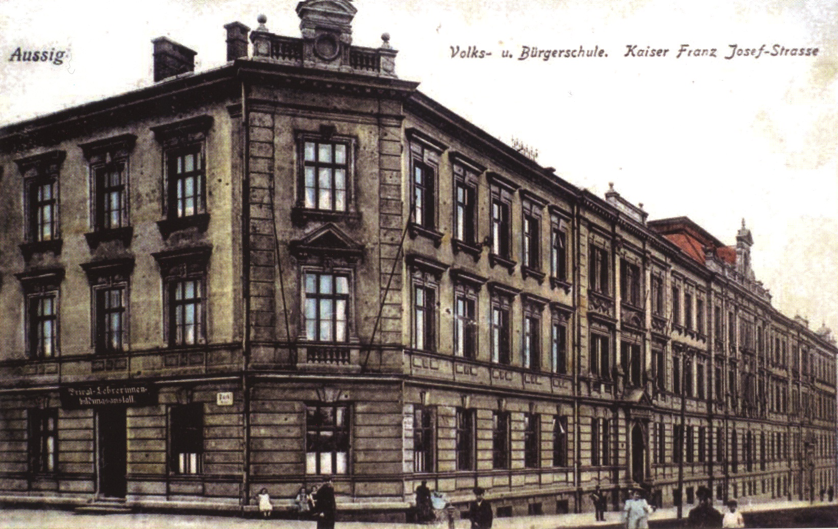 Budova obecné a měšťanské školy po roce 1896